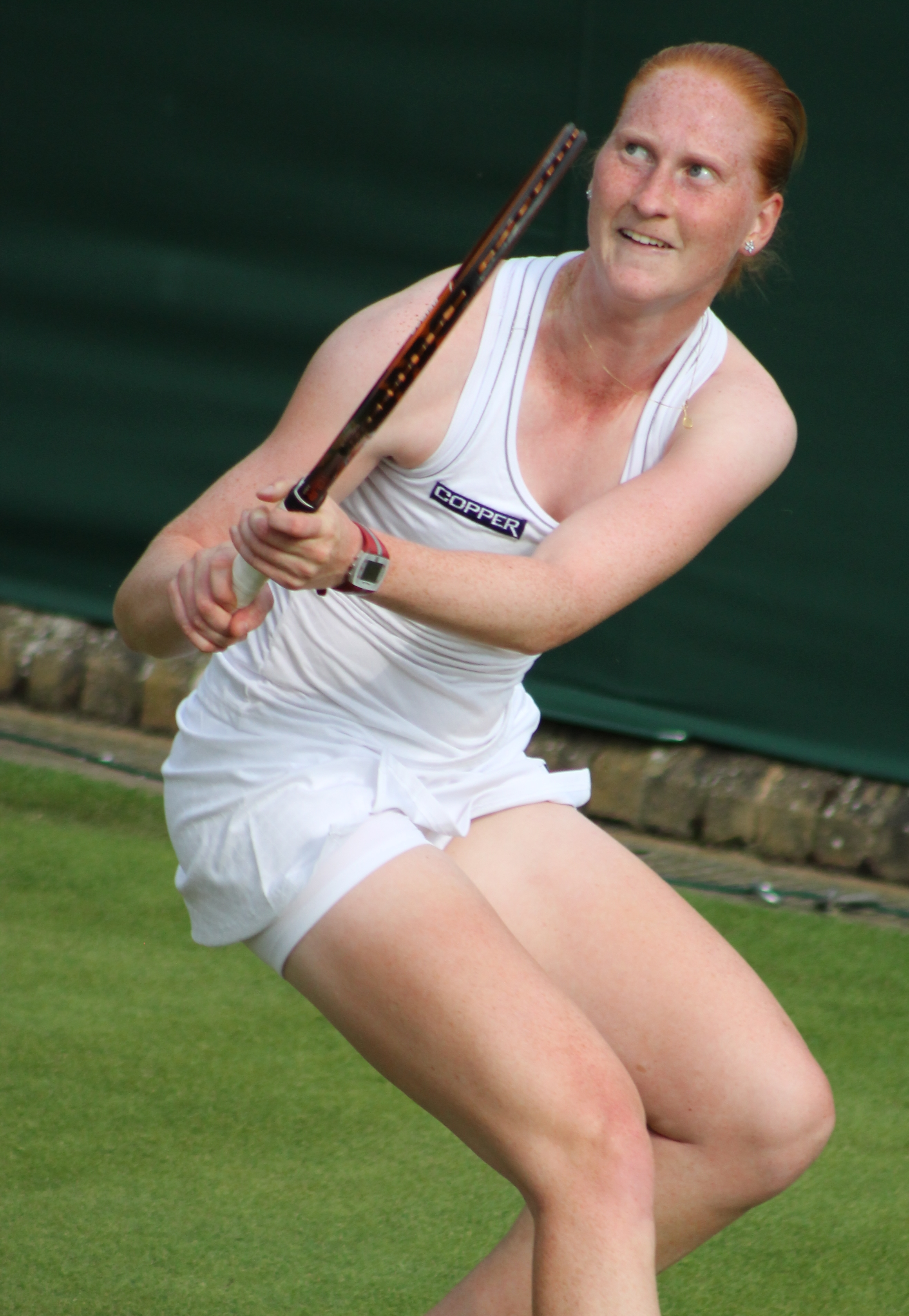 Van Uytvanck WM14 (15)